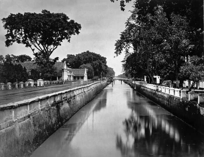 Foto. De Molenvliet te Batavia.